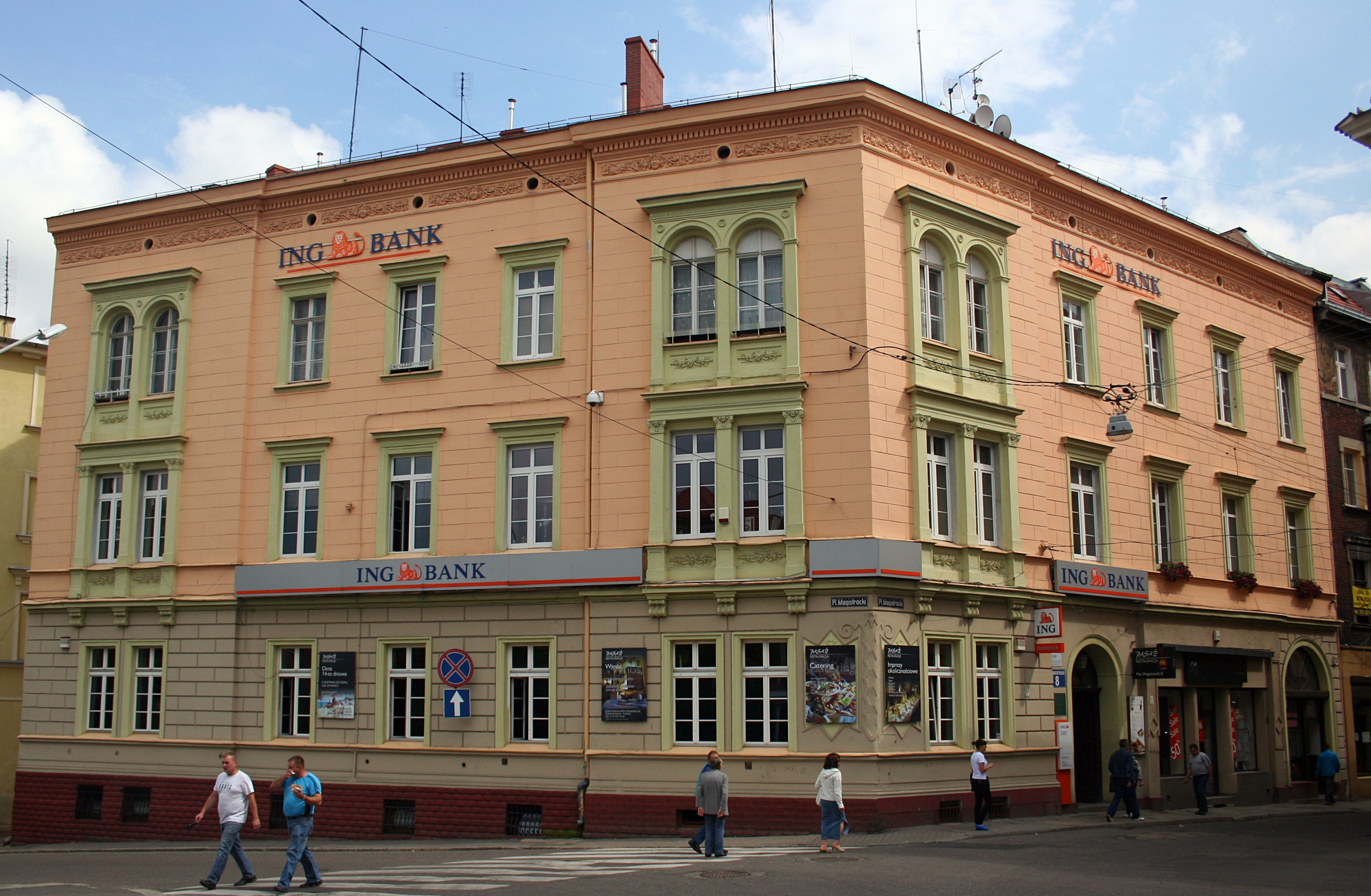 Wałbrzych, pl. Magistracki 8 - kamienica, k. XIX w, obecnie bank (zabytek nr 1426/WŁ z 27.02.1995)